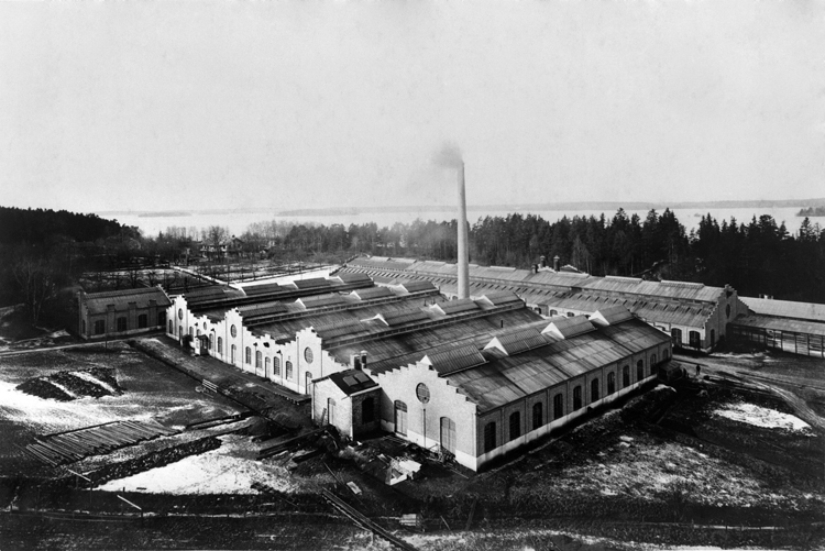 Bolinders Fabriks AB i Kallhäll, Järfälla. Från landsidan med Mälaren i bakgrunden. Våren 1913. Efter foto hos Gustav Bengtsson. Bild nr 00820.